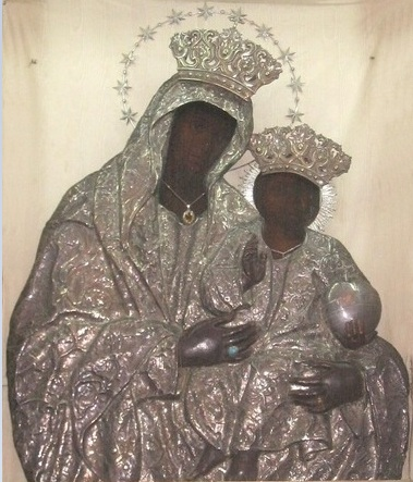 Quadro della Madonna della Lettera collocato sull'altare maggiore della Chiesa Madre di Palmi.